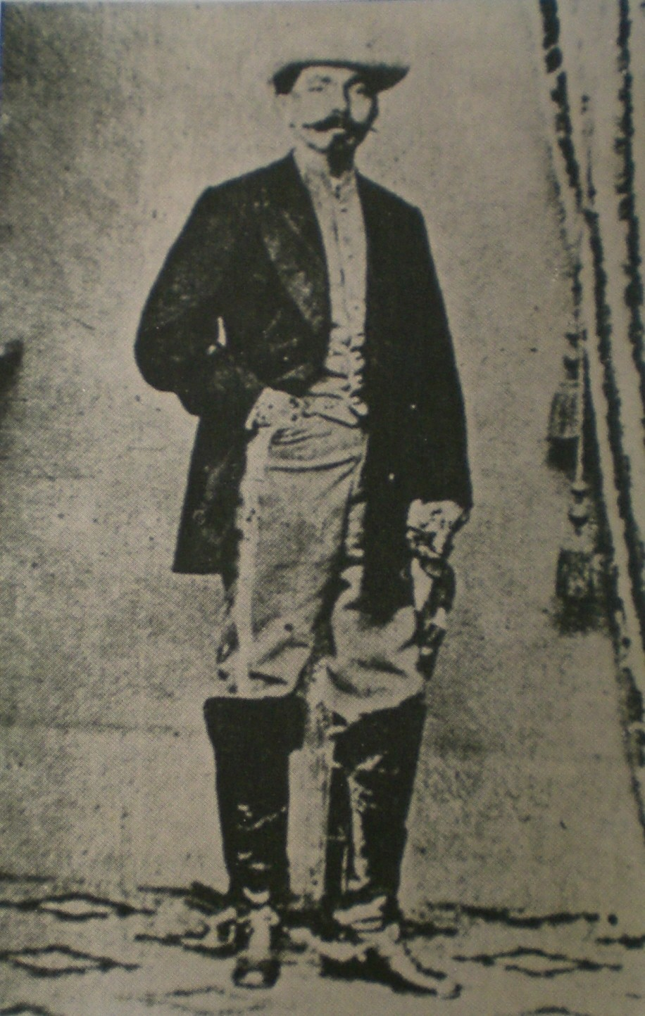 Venezuelan Soldier Matías Salazar (1828 - 1872)